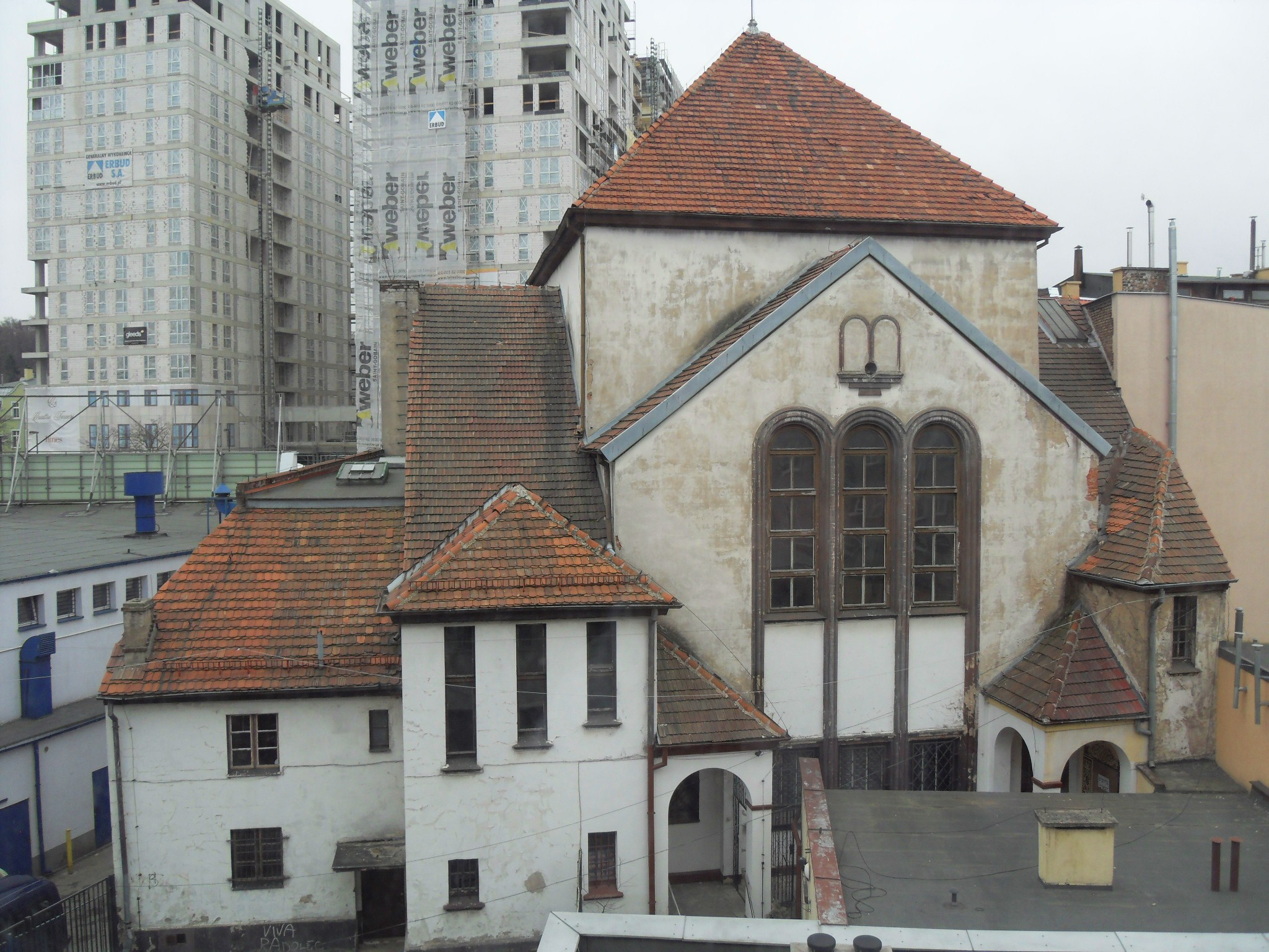 Tył synagogi w Gdańsku Wrzeszczu. W tle Quattro Towers.